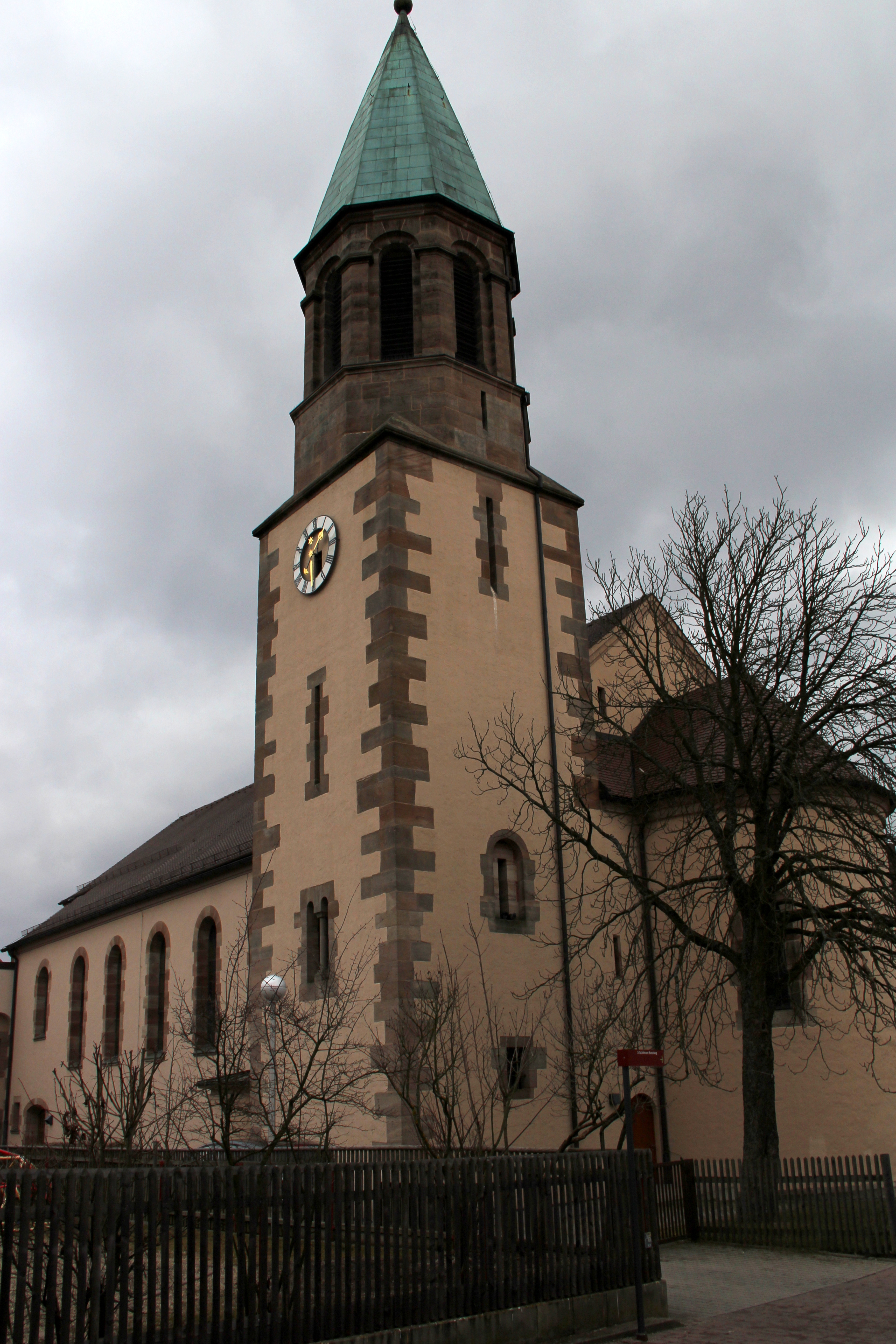 Herz Jesu Kirche Feucht